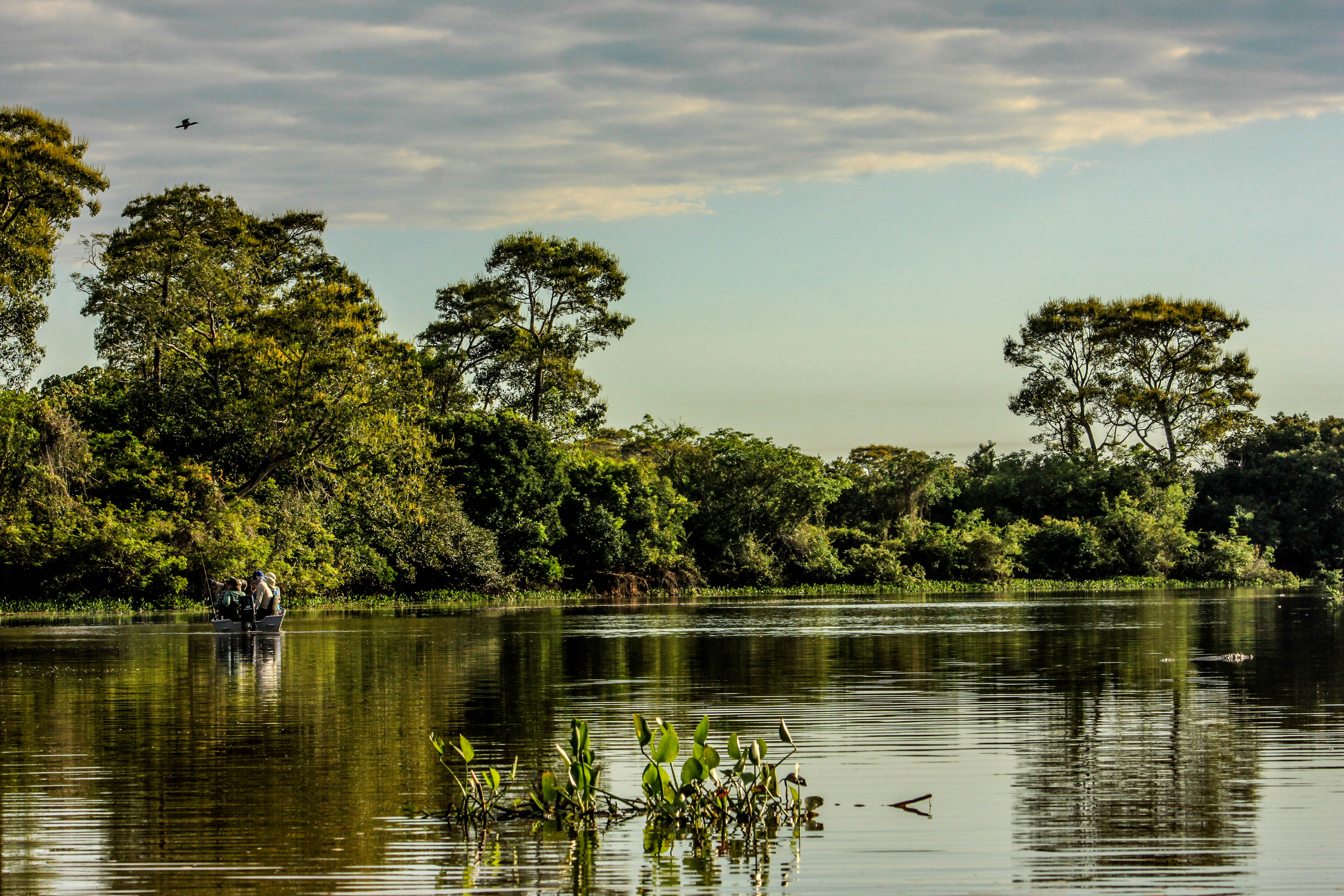 Registro da paisagem vista do barco.